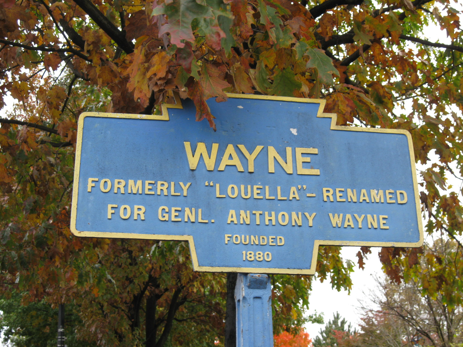 Keystone Marker for Wayne, Pennsylvania